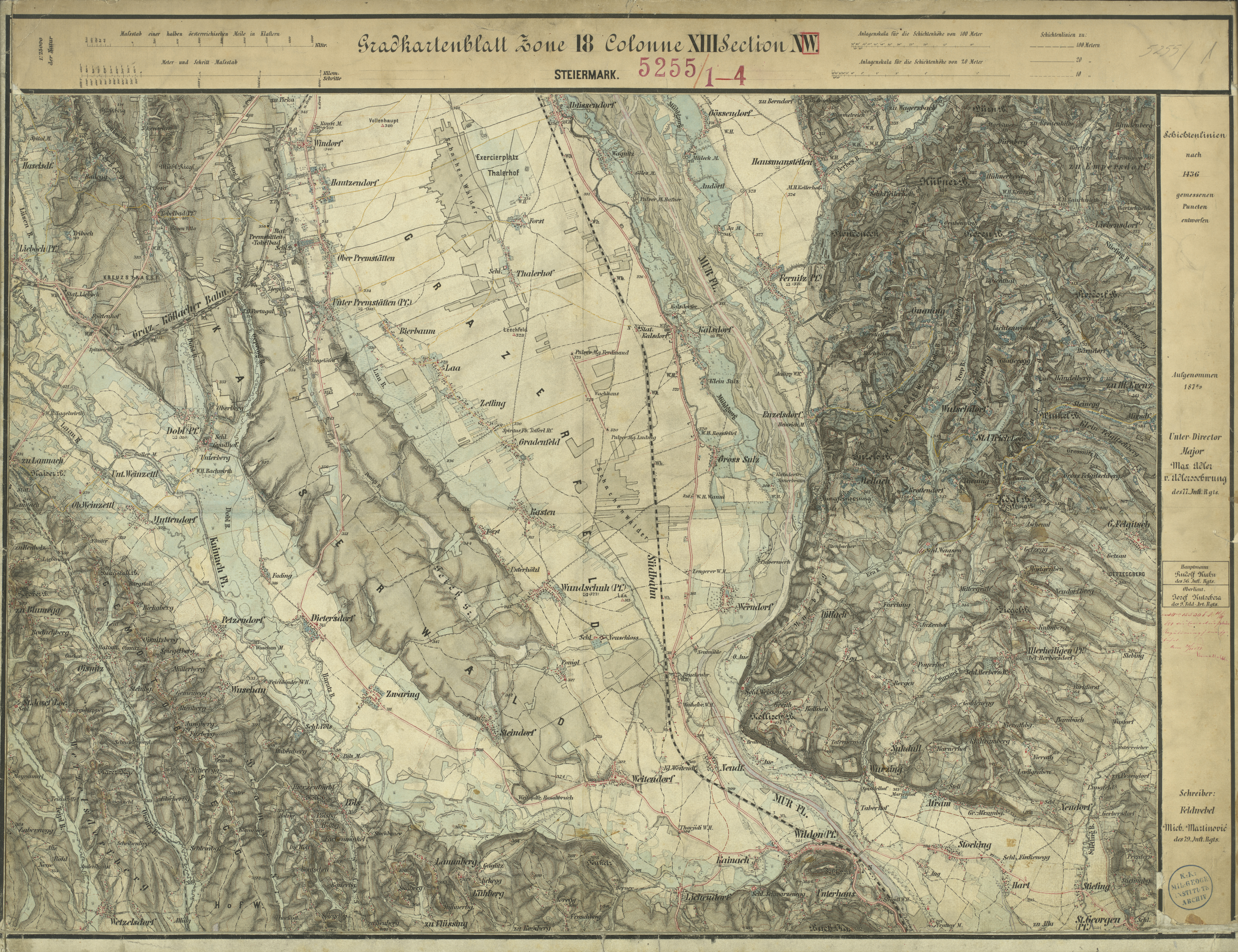 historische Landkarte: Gradkartenblatt Zone 18 Colonne XIII Section NW (später 5255/1). Gebiet Wildon, Unterlauf der Kainach (Kainachboden), südliches Grazer Feld. Franzisco-josephinische (3.) Landesaufnahme der österreichisch-ungarischen Monarchie. Aufnahmeblatt 1:25.000. Aufgenommen 1878/79